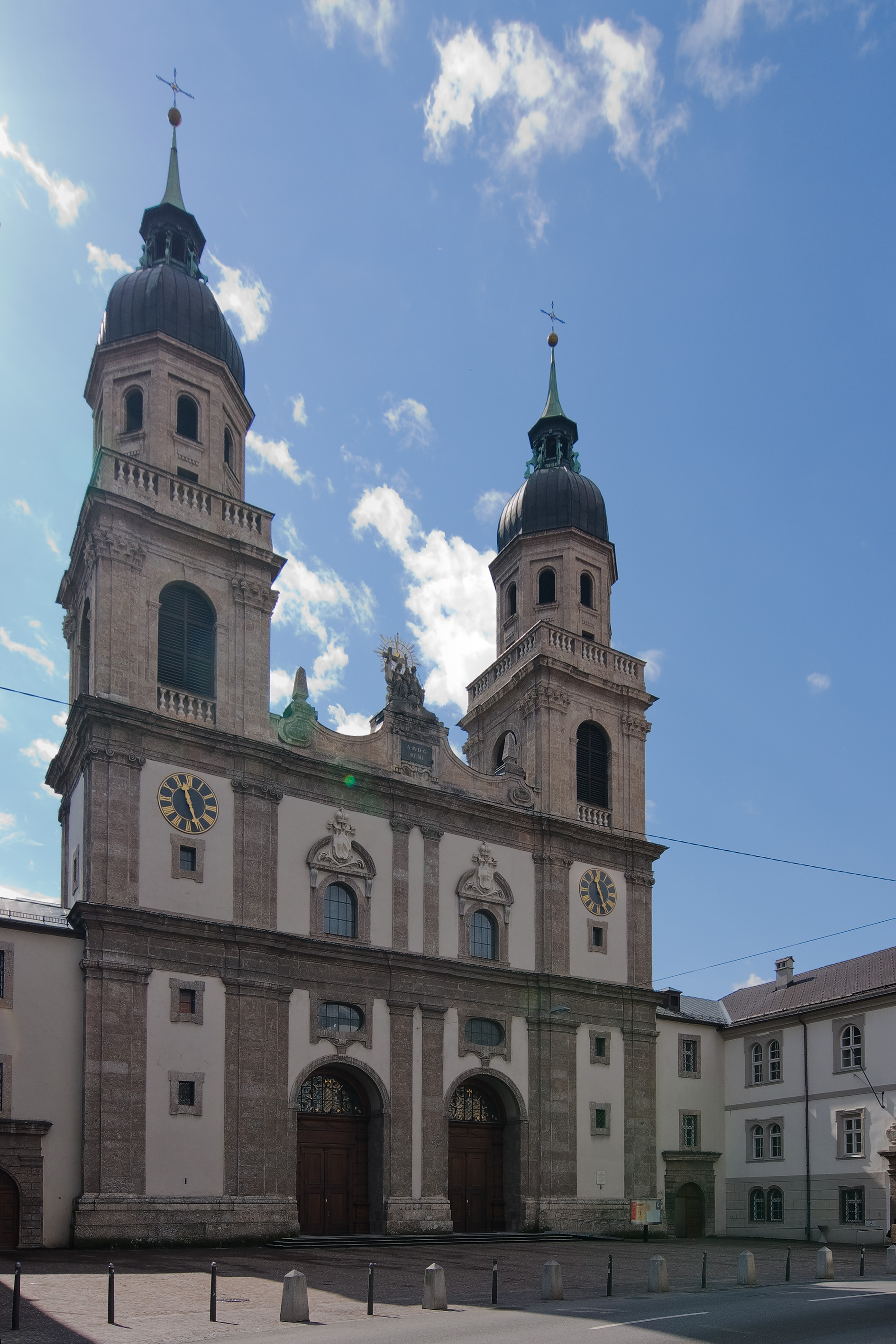 Die Jesuitenkirche in Innsbruck